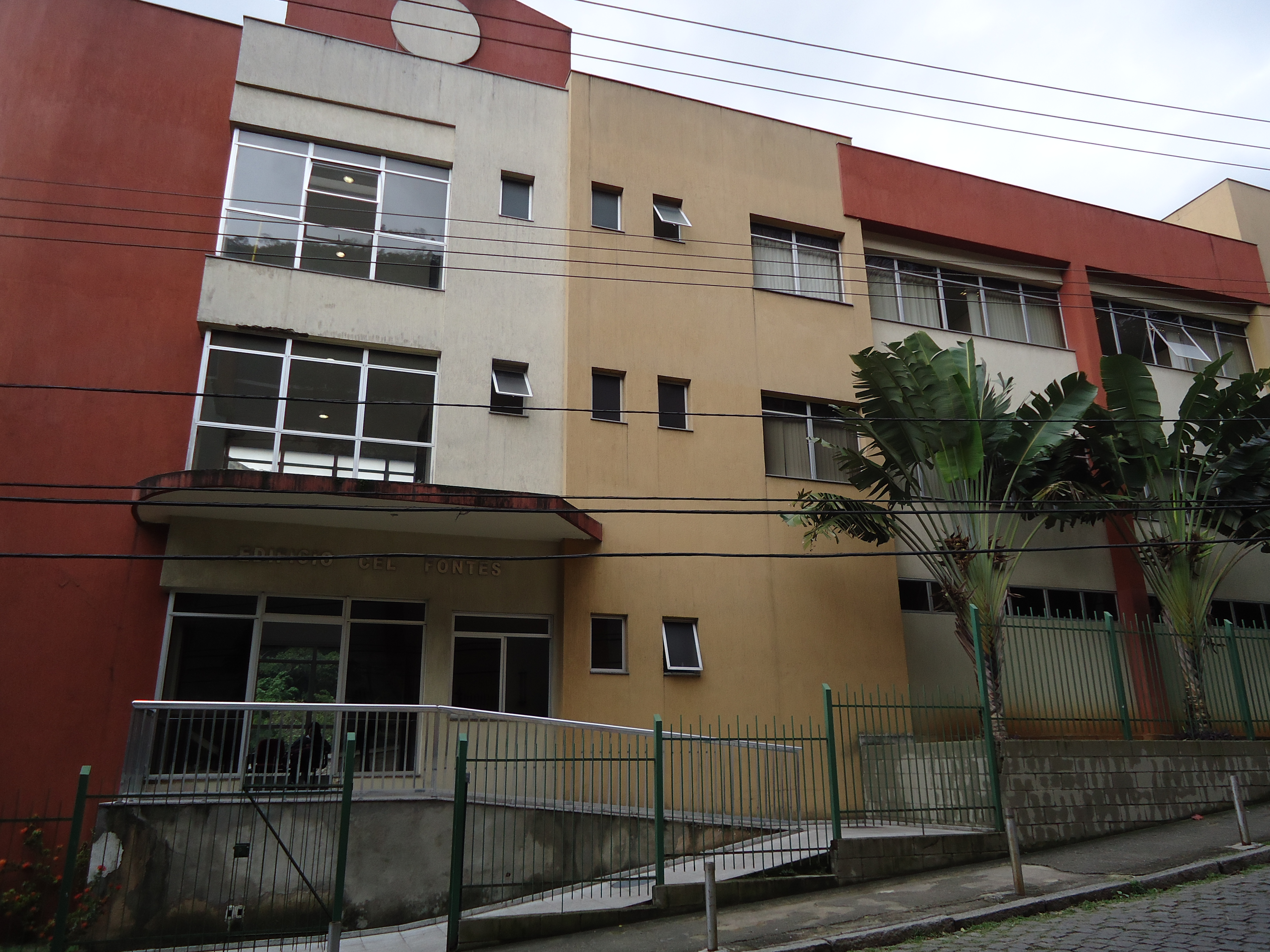 Fundação Osório, Rio Comprido, Rio de Janeiro, RJ, Brasil: vista do prédio novo.